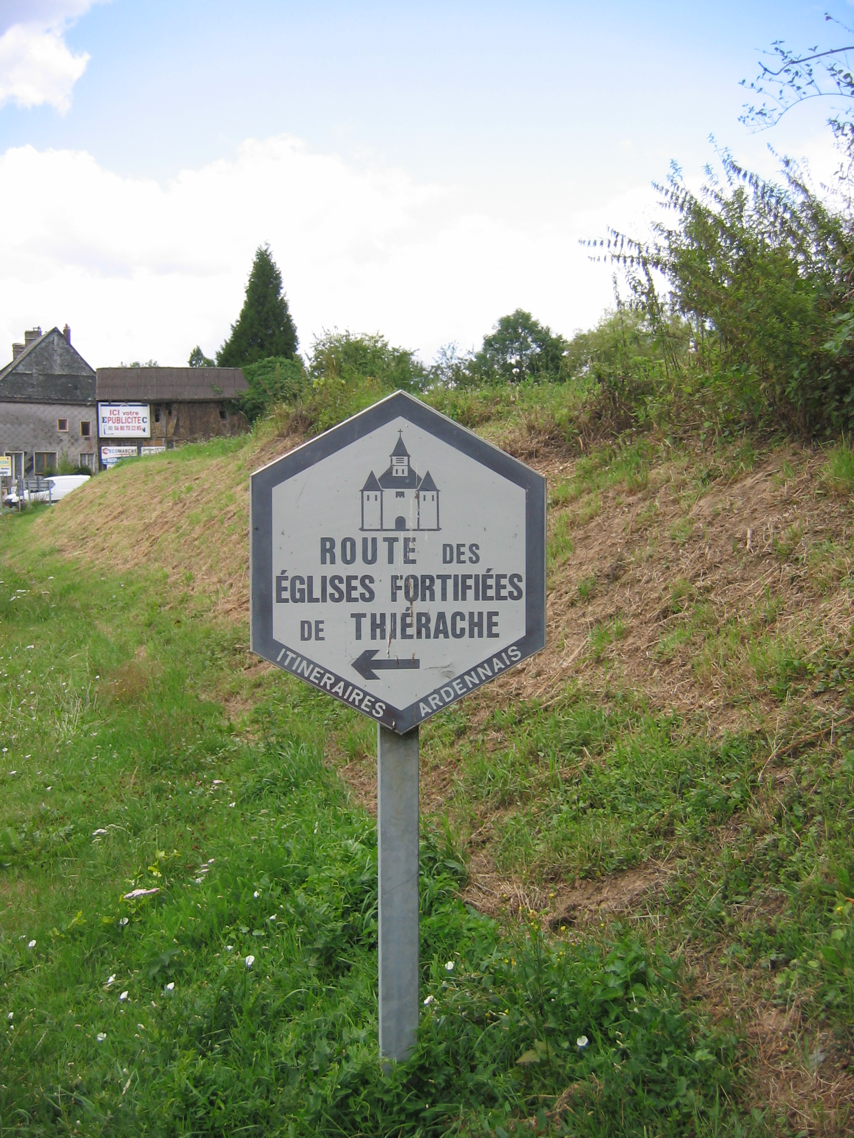 Photo d'un panneau routier indiquant une route touristique